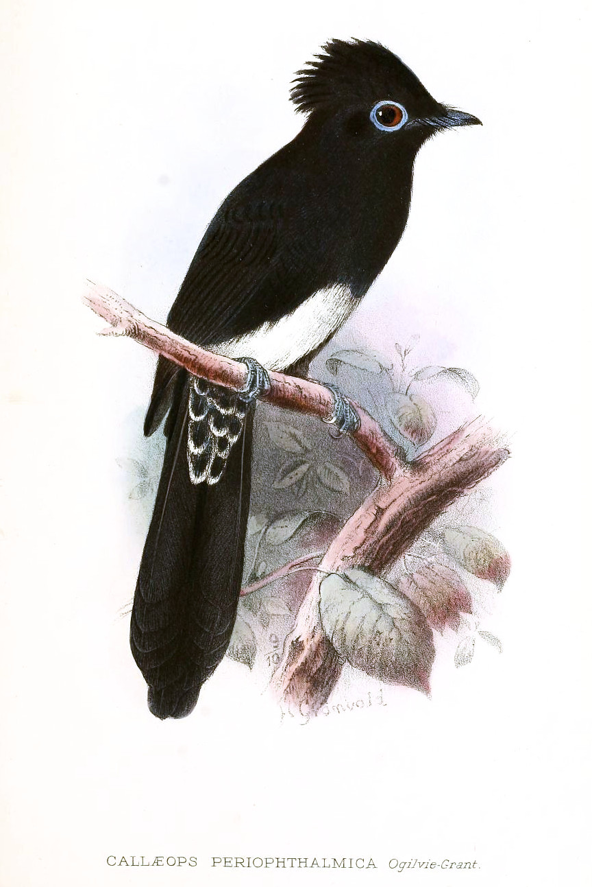 Callaeops periophthalmica= Terpsiphone atrocaudata periophthalmica